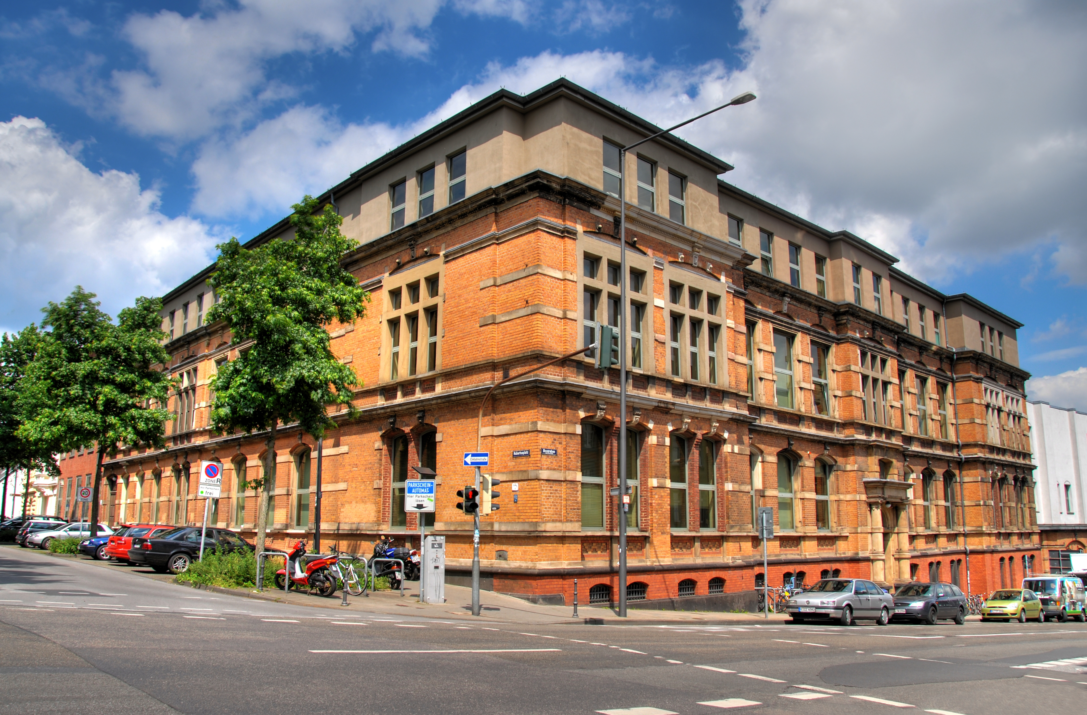 Gebäude Boxgraben